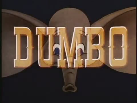 Imatges del tràiler de la pel·lícula "Dumbo". Els tràilers de les pel·lícules publicats abans de 1964 als Estats Units es troben en domini públic